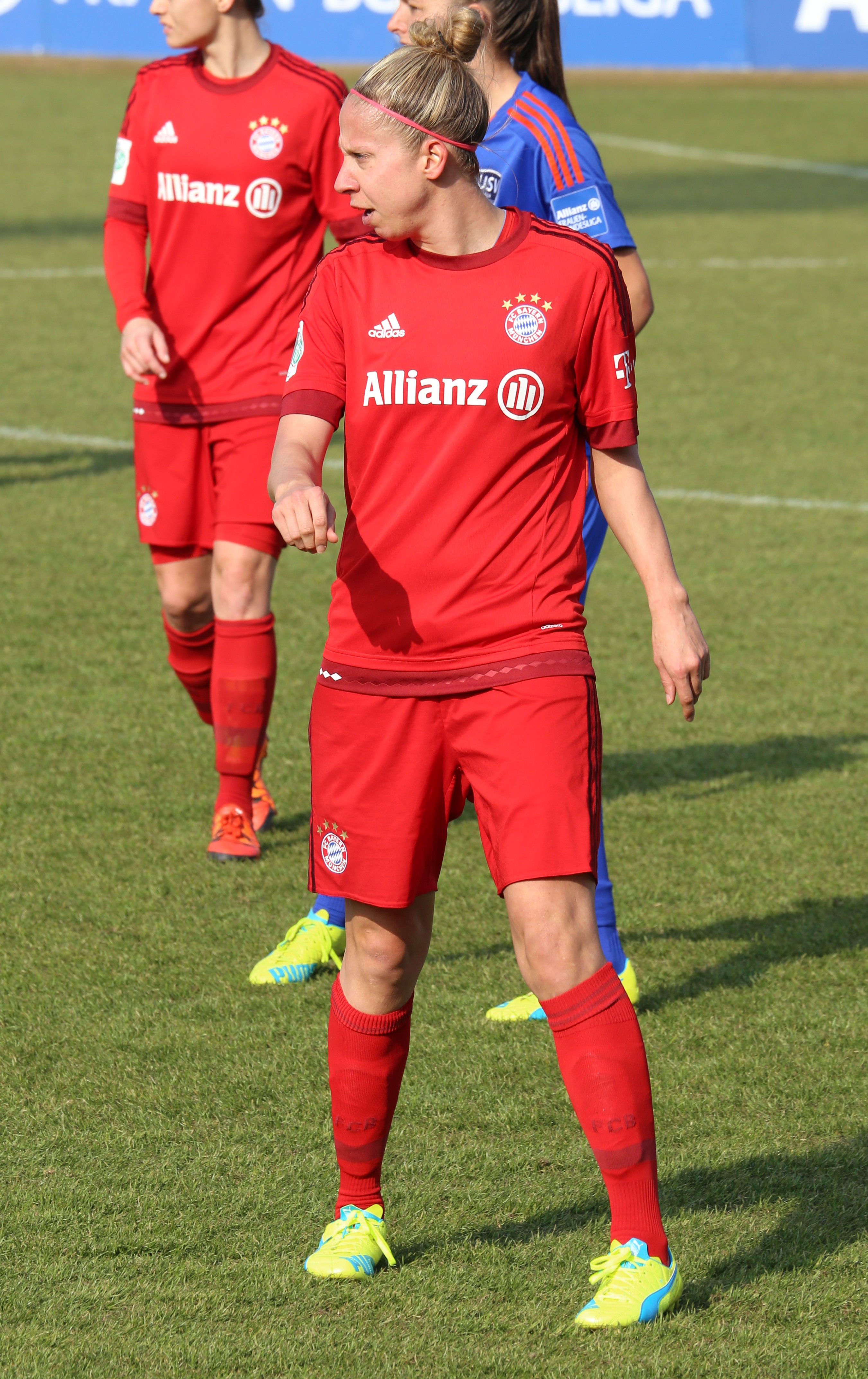 Caroline Abbé (FC Bayern München) beim Frauen-Bundesliga-Spiel FC Bayern München gegen FF USV Jena am 19. März 2016 im Stadion an der Grünwalder Straße (Ergebnis war 5:1).